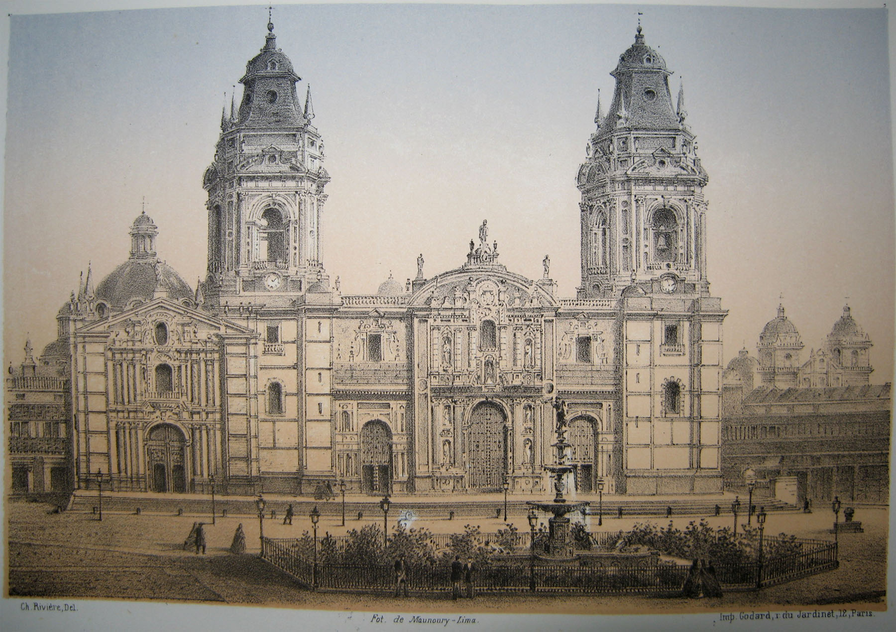 Grabado de la catedral y plaza mayor de Lima que uso como base una foto del fotografo Frances radicado en Lima Eugene Maunoury